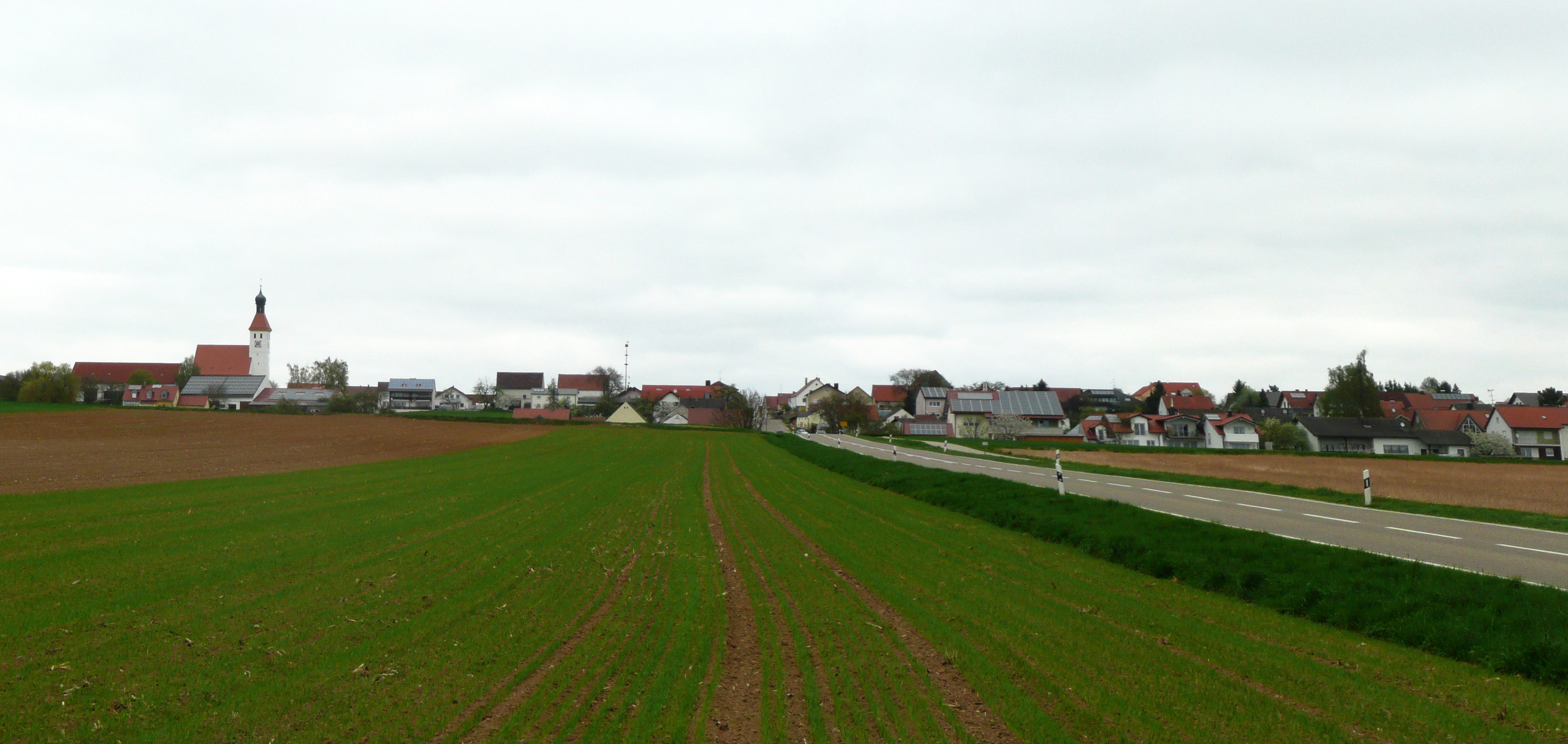 Möckenlohe mit ehemaliger Römerstraße. Teilansicht von S.